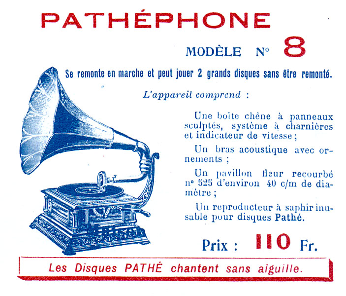 Pathéphone No. 8.